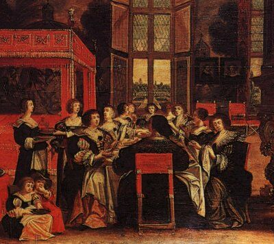 =Frauen am Tisch in Abwesenheit ihrer Ehemänner